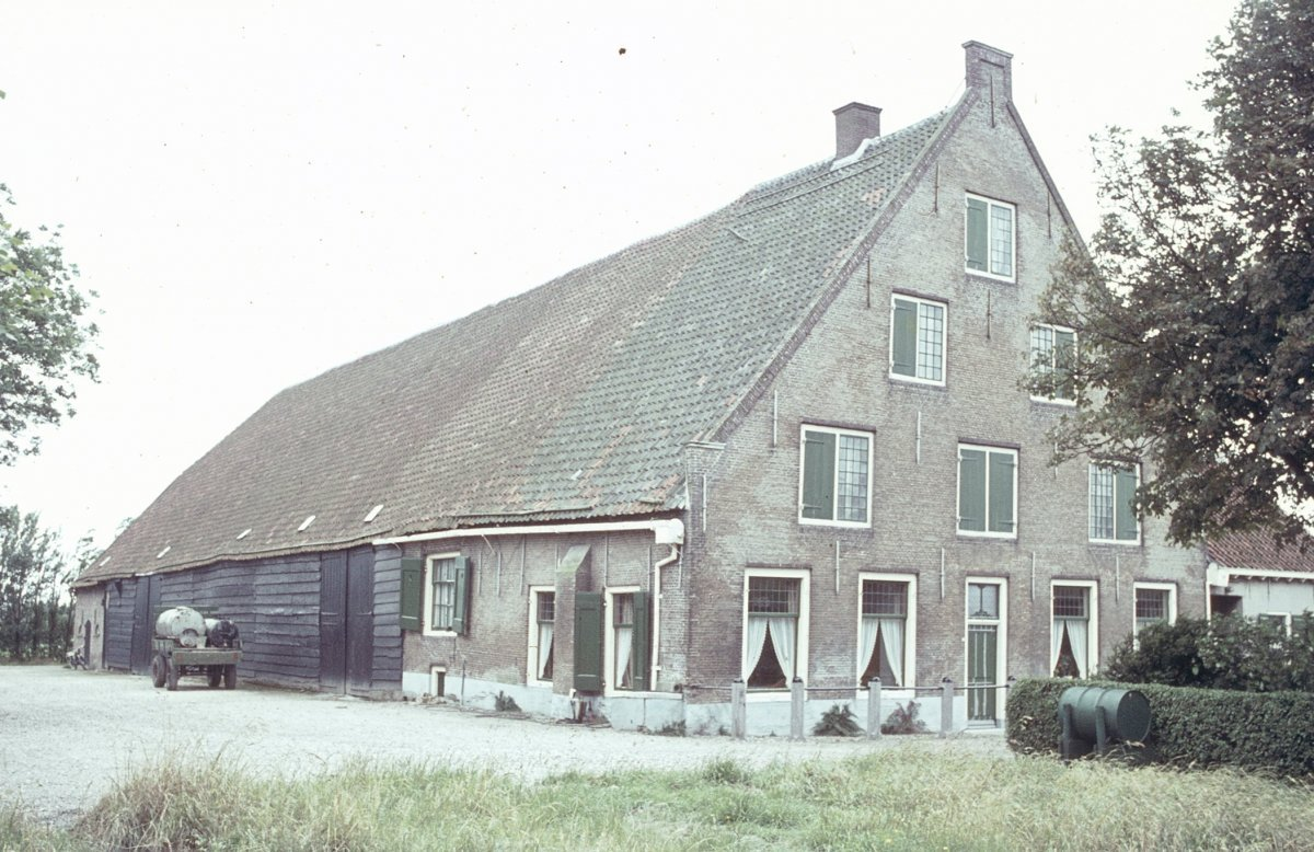 Boerderij AKKERZORG: Exterieur OVERZICHT VOORGEVEL, LINKER ZIJGEVEL